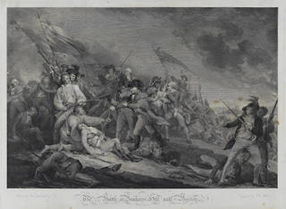 Johann Gotthard Müller (1747–1830) »The Battle at Bunkers Hill near Boston« nach John Trumbull (1756–1843) 1798, Kupferstich und Radierung auf Bütten, Blatt: 59,1 x 80,2 cm, Platte: 58,5 x 79,9 cm, Inv. Nr. A 1989/6350